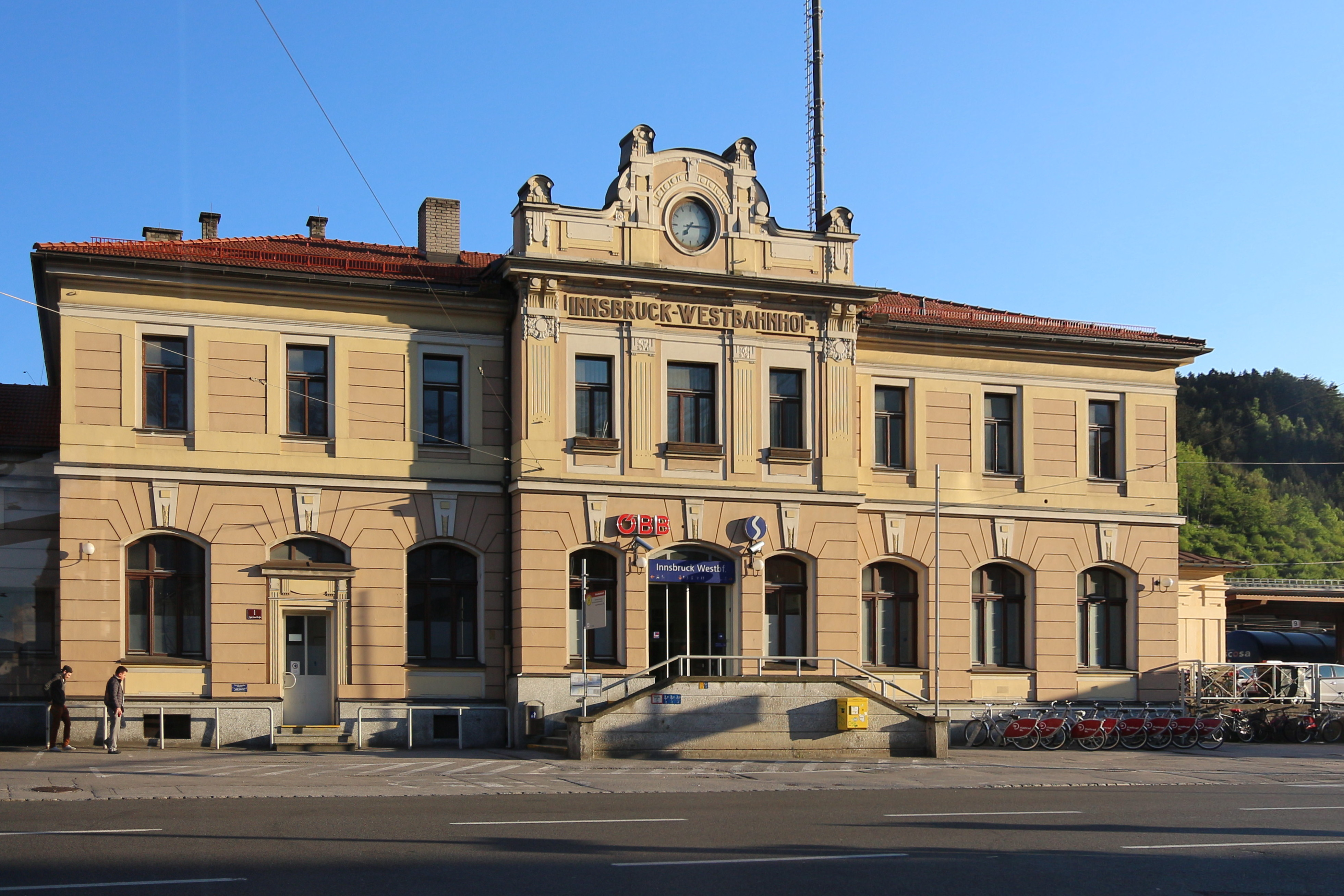 Innsbruck Westbahnhof